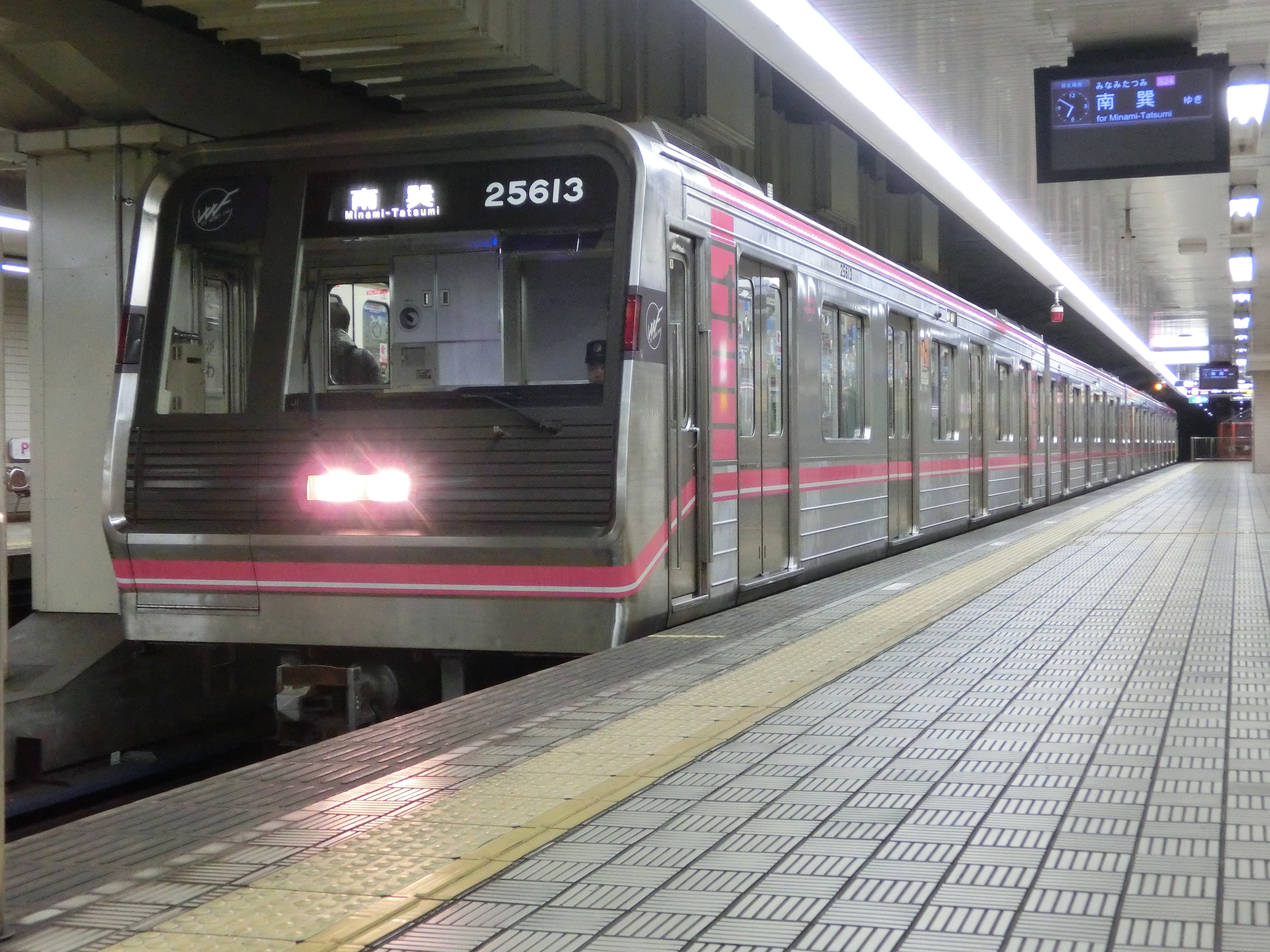 大阪市交通局（大阪市営地下鉄） 25系 25613F 撮影：玉川駅